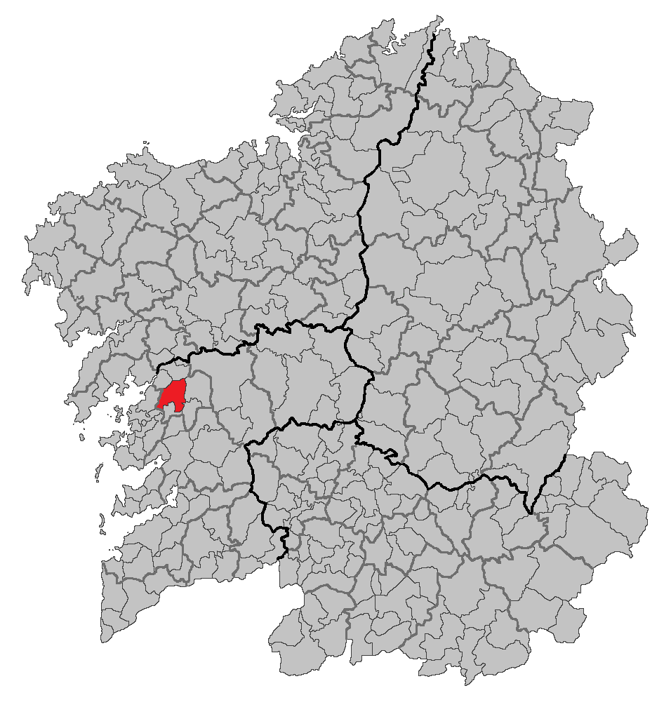 Mapa coa localización do concello de Caldas de Reis.